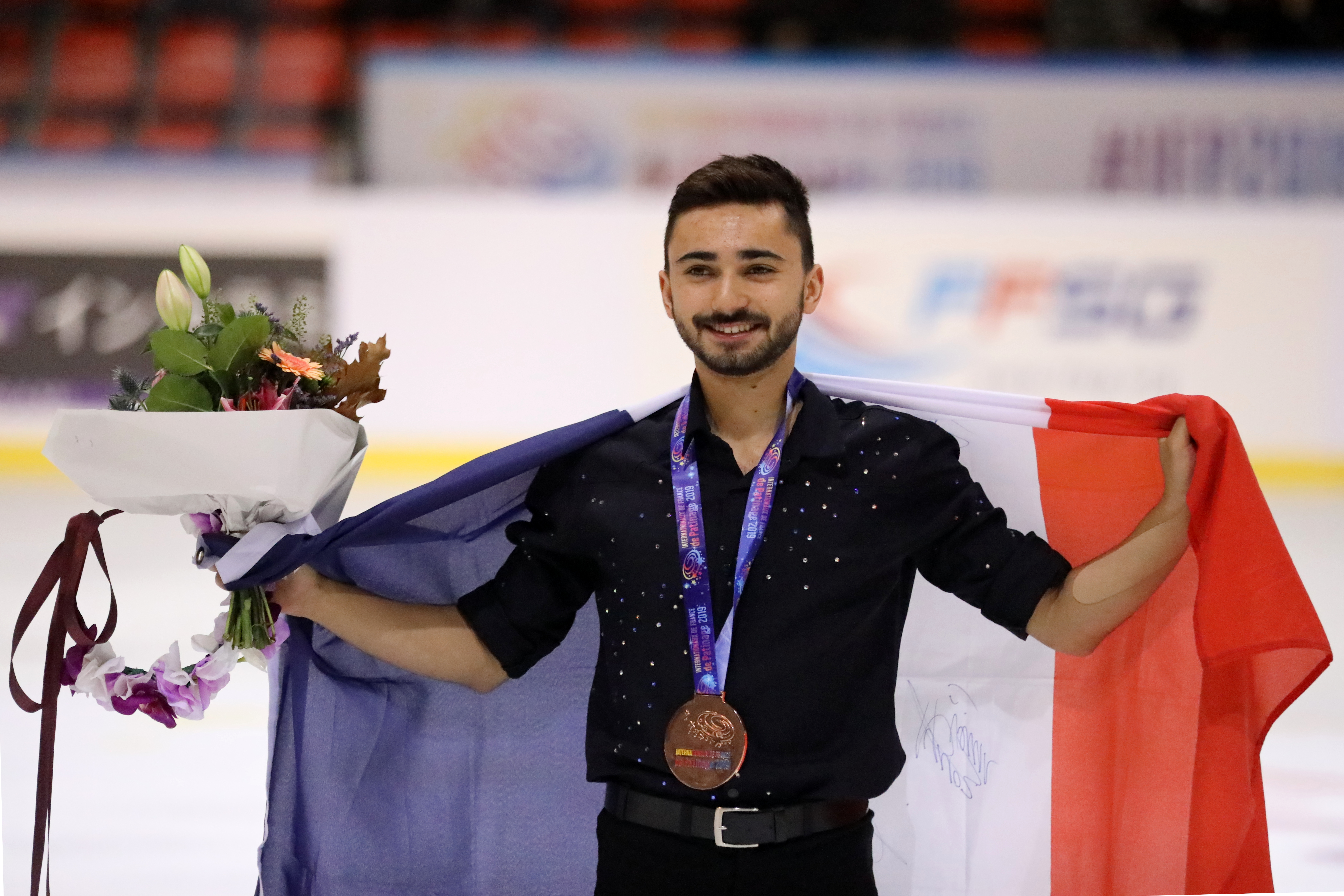 Internationaux de France 2019